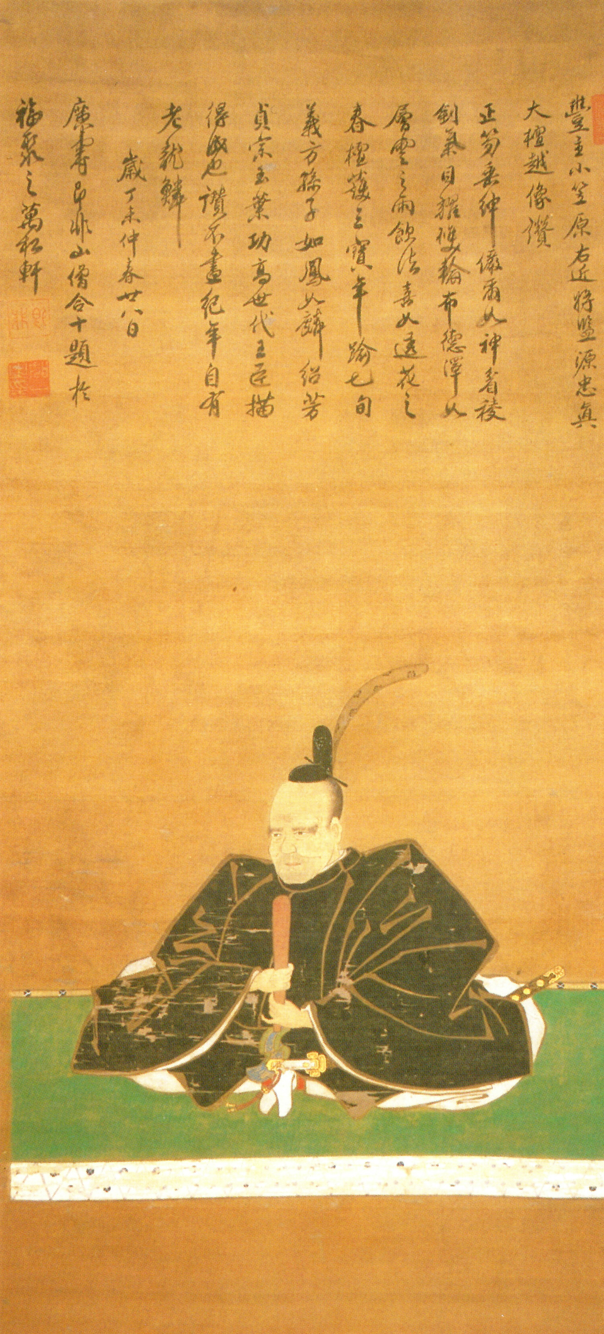 小笠原忠真の肖像。